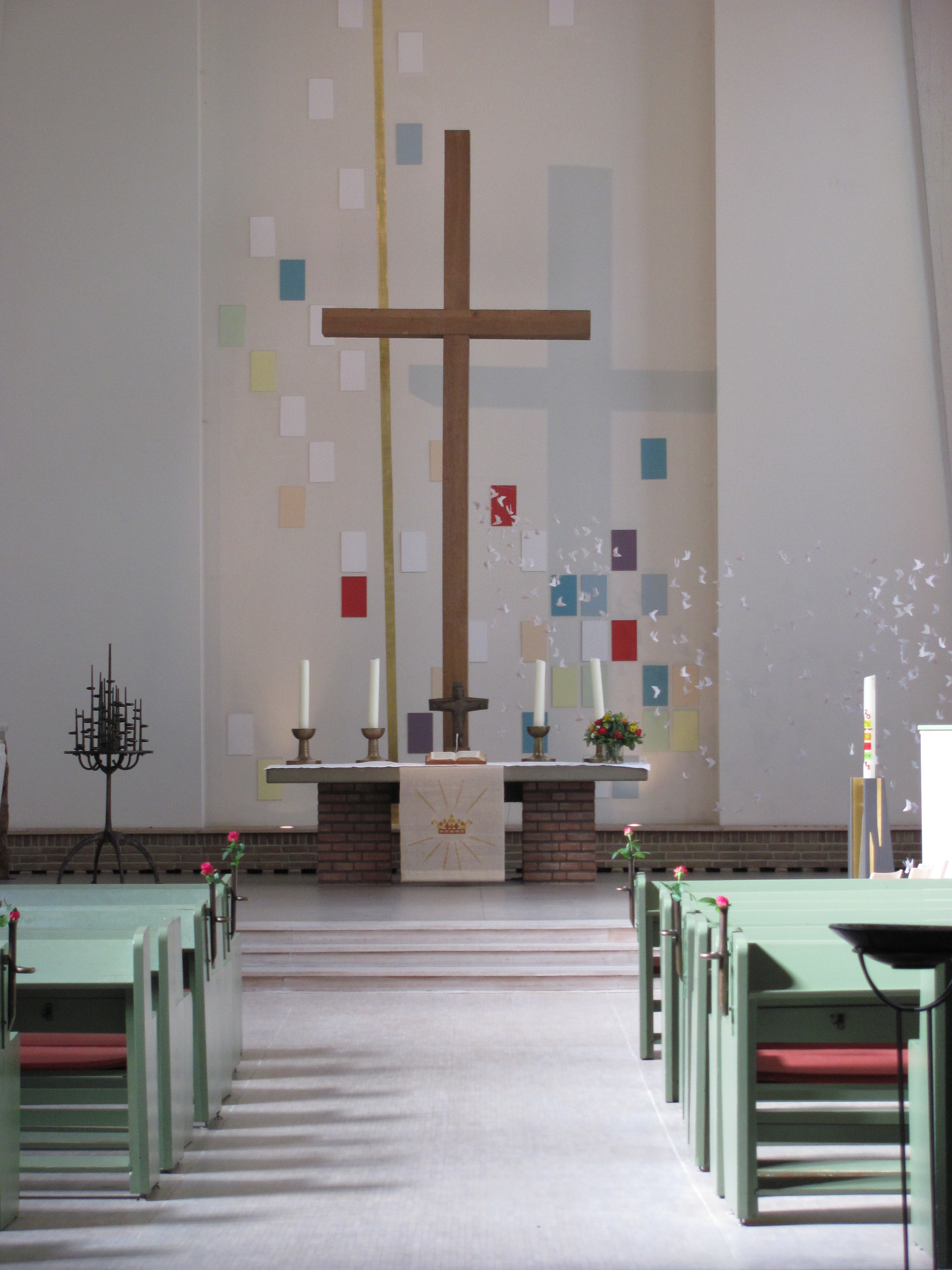 Christ-König-Kirche in Hamburg-Lokstedt, Altar